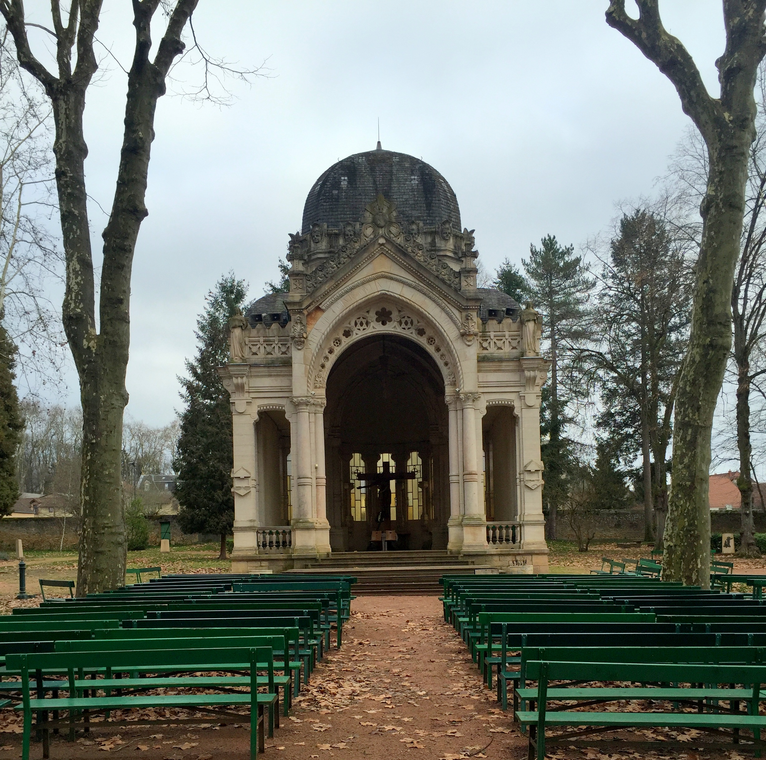 Image de Paray-le-Monial, Saône-et-Loire, France.